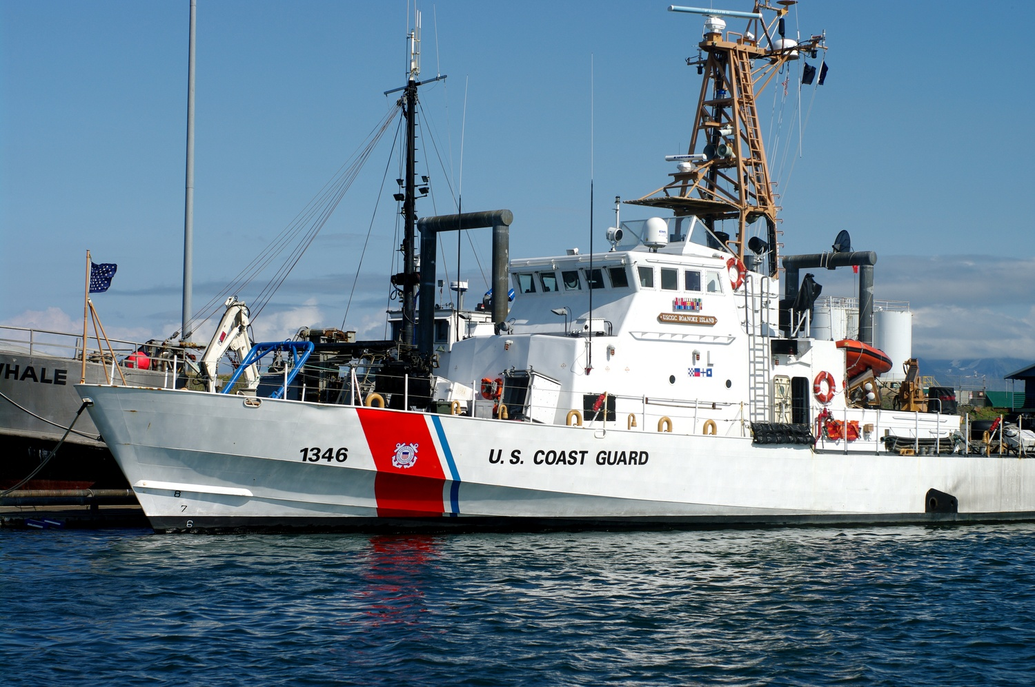 Homer harbor, Alaska.